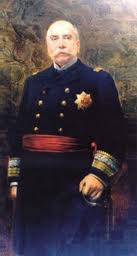 Vicealmirant Victor Maria Concas y Palau